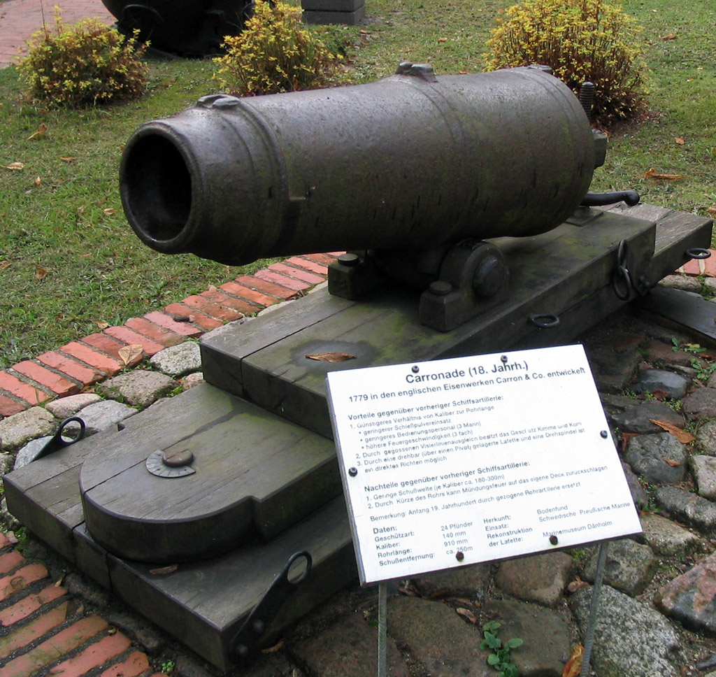 Beschreibung: Karronade, ausgestellt im Marinemuseum Dänholm Fotograf: Darkone, de:25. Oktober 2004